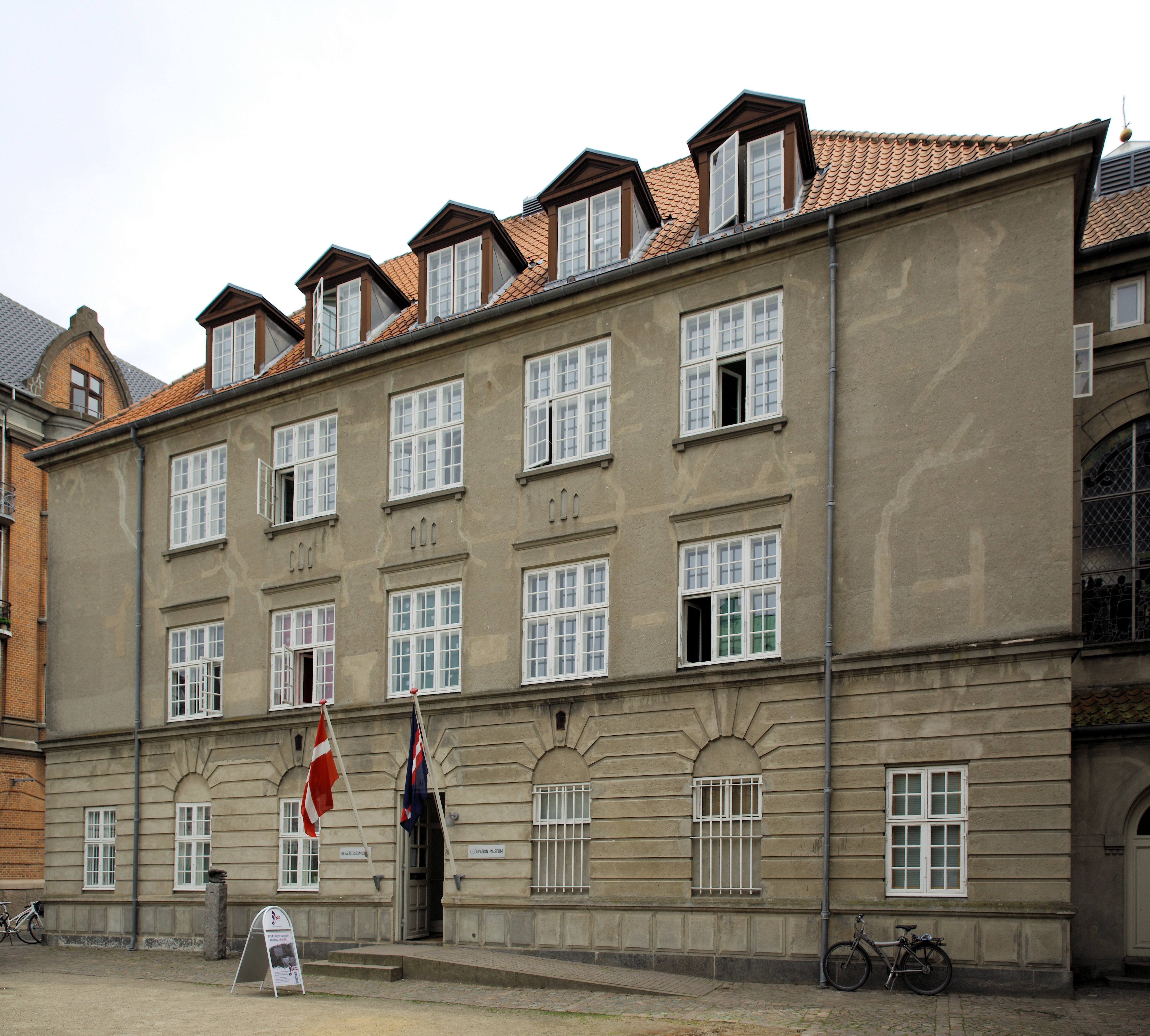 Besættelsesmuseet